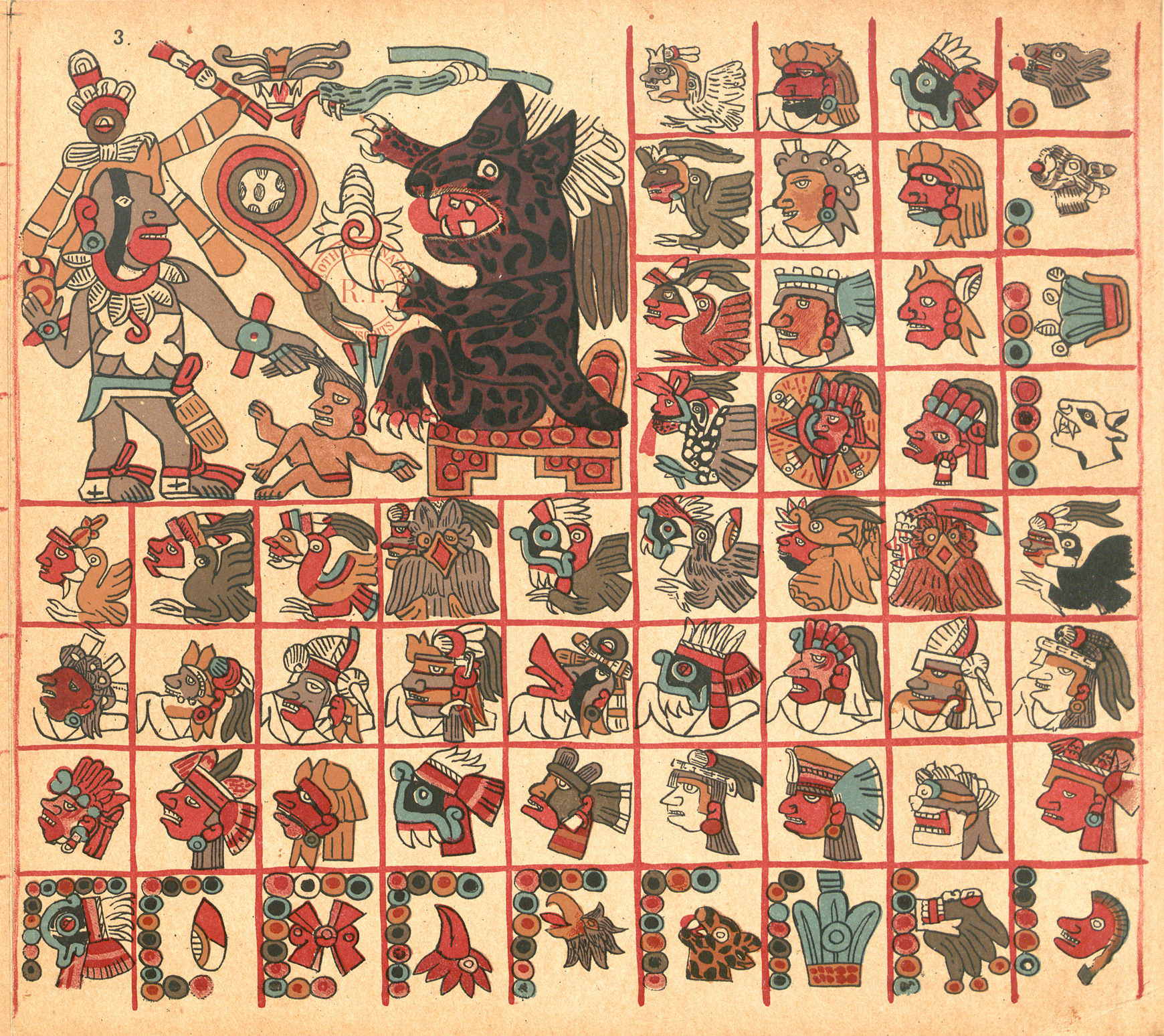 Lámina 3 del Tonalámatl de Aubin, códice mexica de la colección del duque de Loubat.